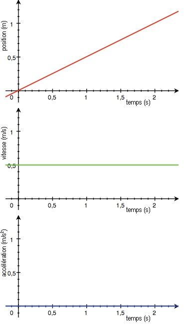 Evolution de la position, de la vitesse et de l'accélération d'un corps dans un mouvement rectiligne uniforme.